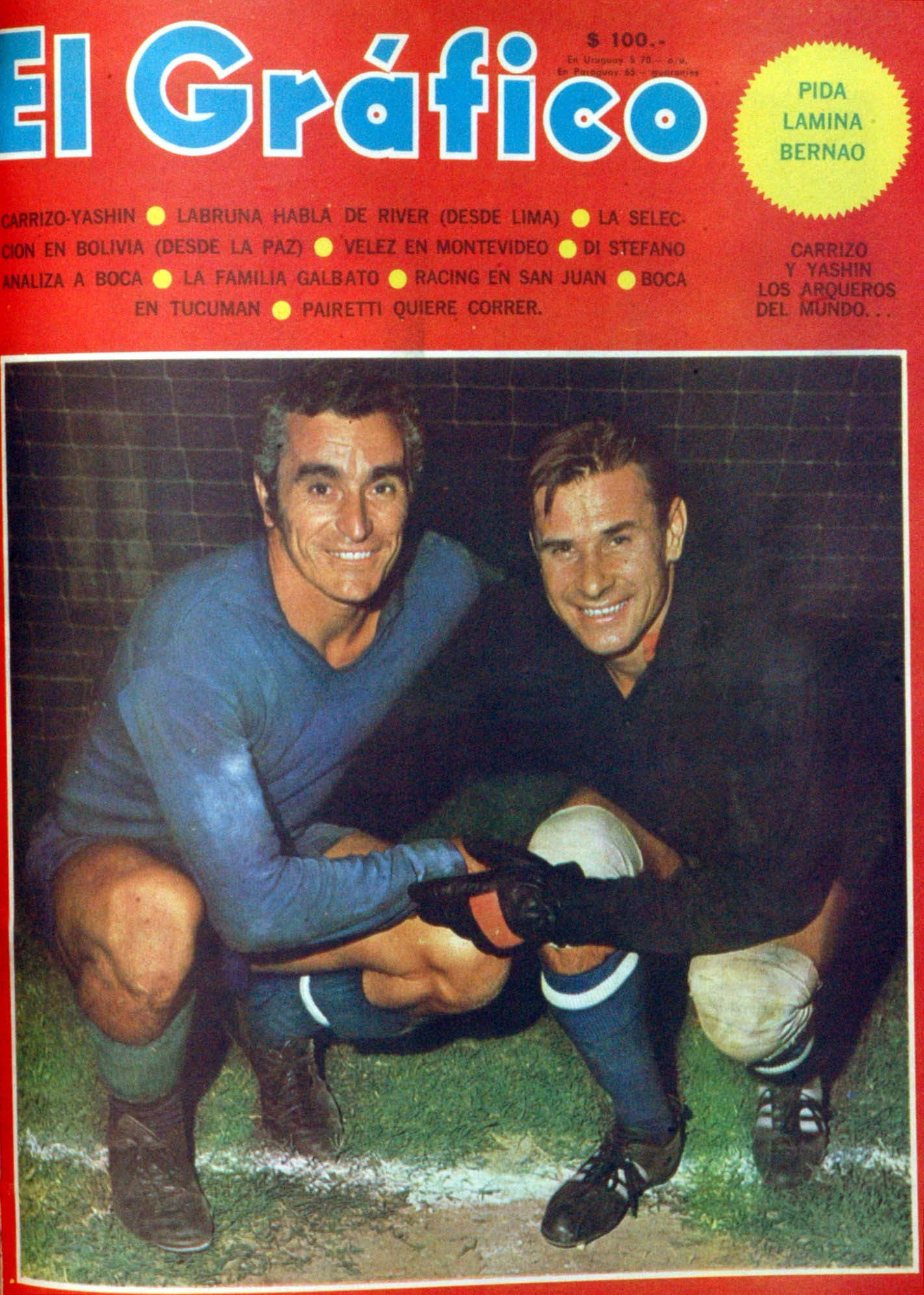 El Grafico del 11 de Febrero de 1969. Edicion 2575